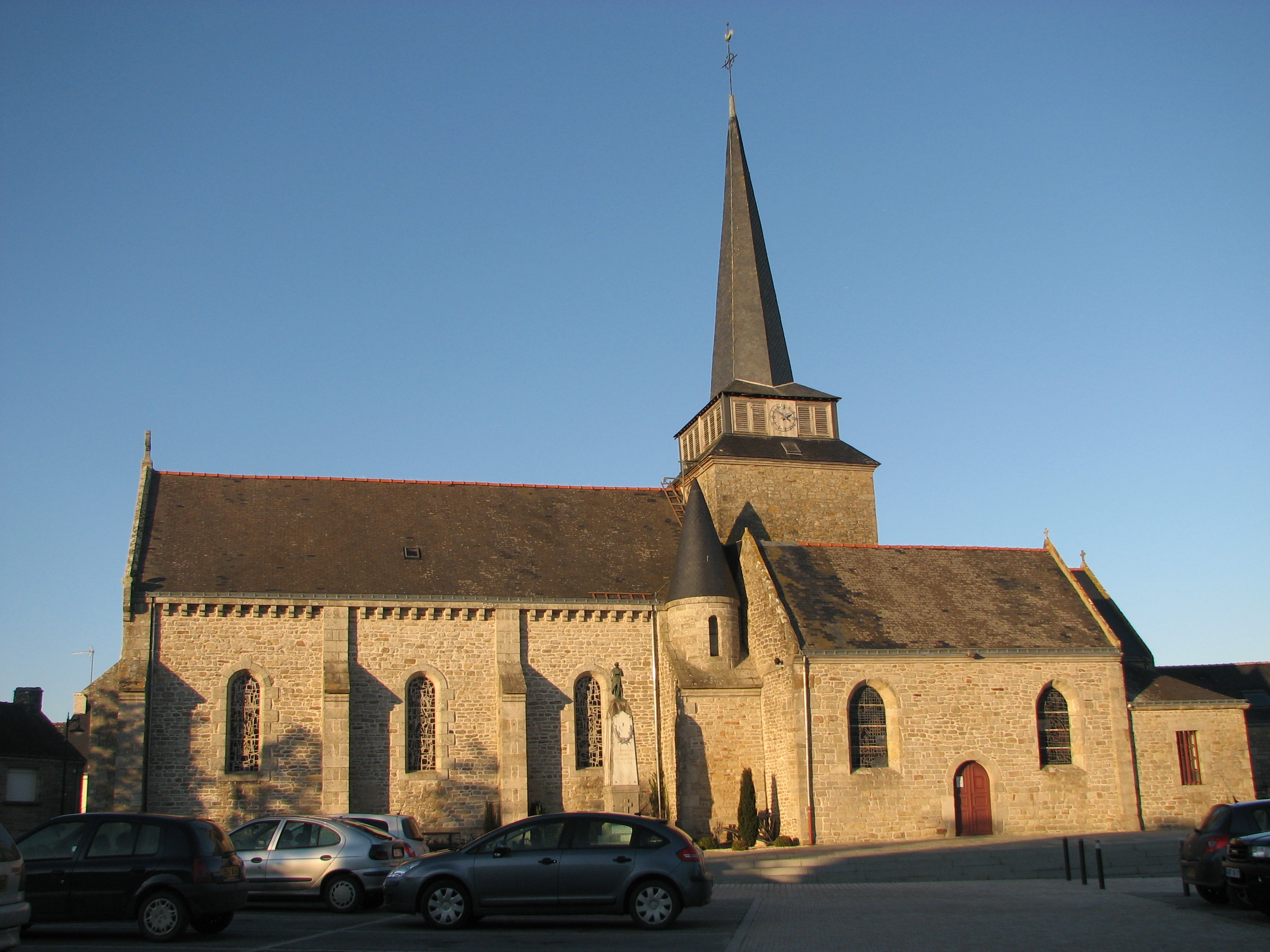 Église de Sulniac (Morbihan).